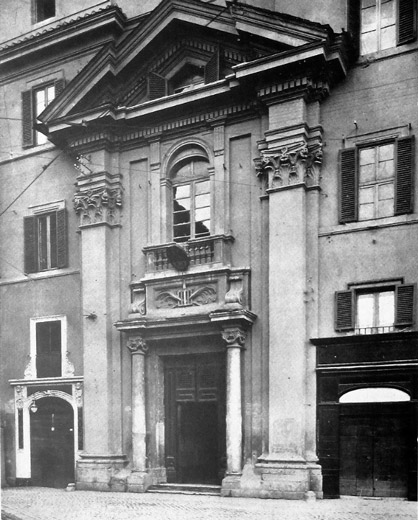 Old faccade of San Lorenzo in Piscibus in Borgo Santo Spirito (ca. 1930s)